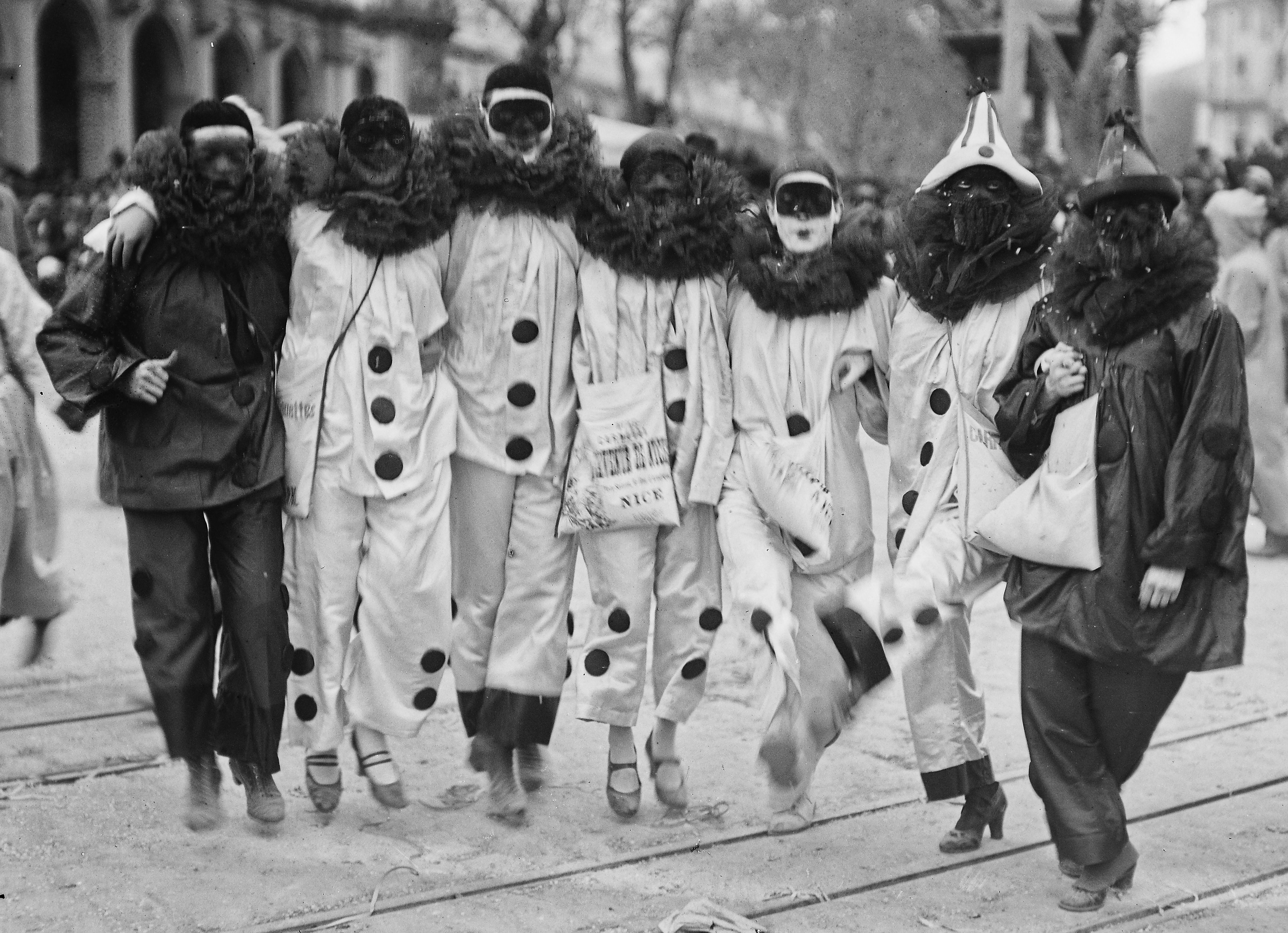 Des Pierrots au Carnaval de Nice. Celui du milieu (une jeune fille reconnaissable à ses chaussures) porte en bandoulière un grand sac de confettis.